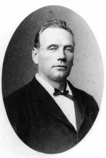 foto de Jorge Claraz a los 38 años